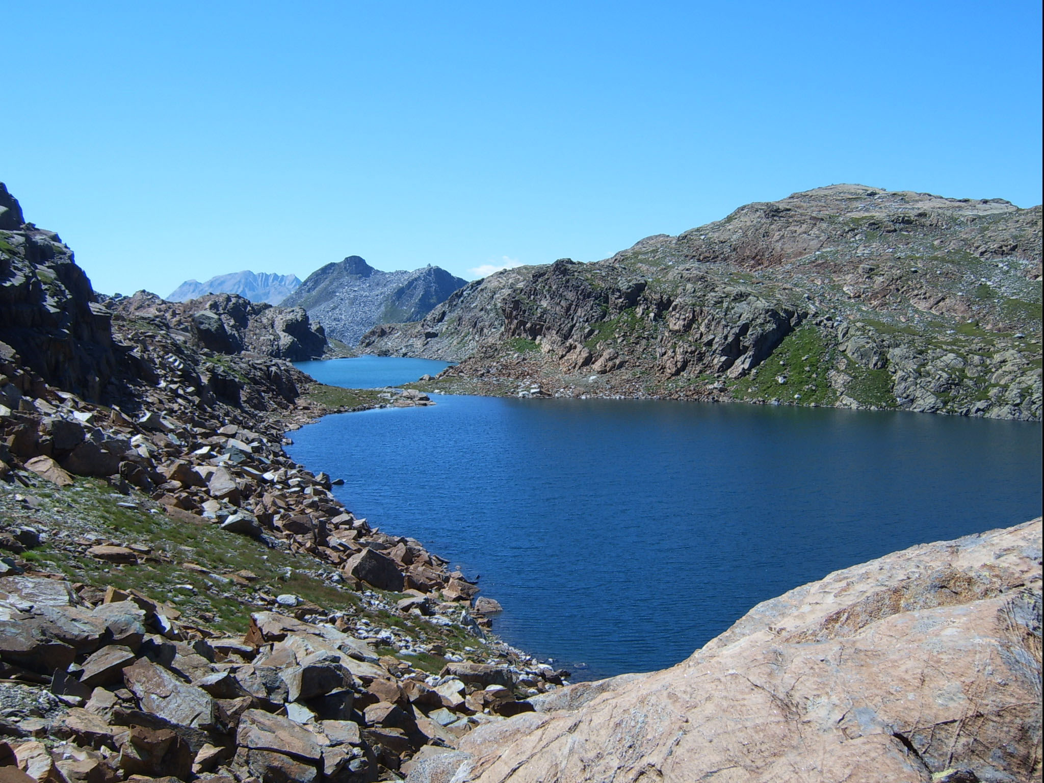 Landschaftspark Binntal